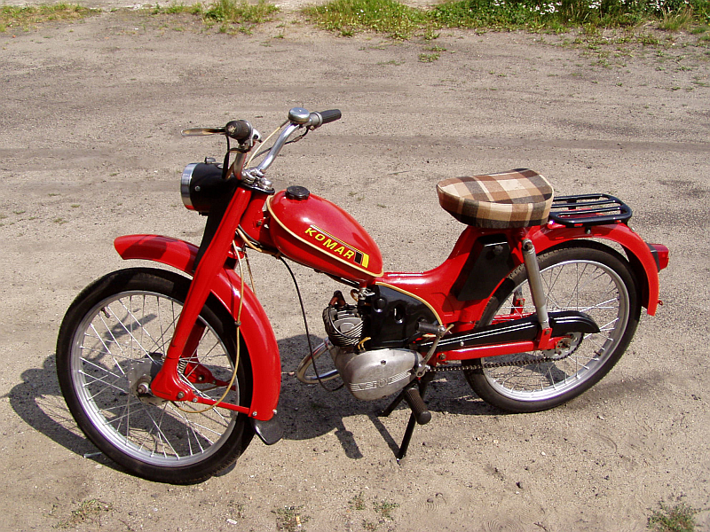 Motorower Romet Komar 2350